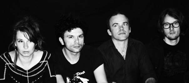 Photo du groupe de musique Eiffel